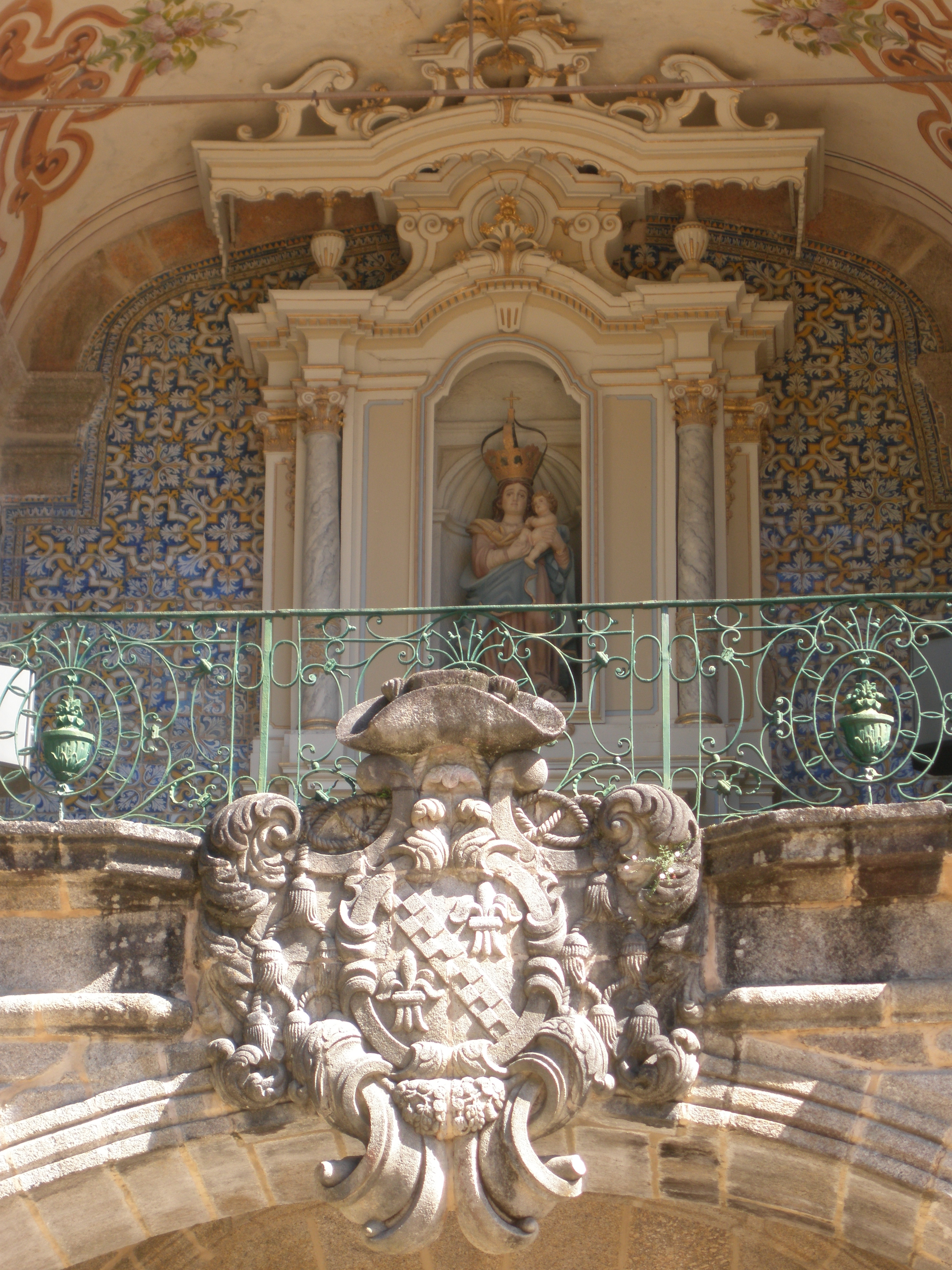 Detalhe do Santuário